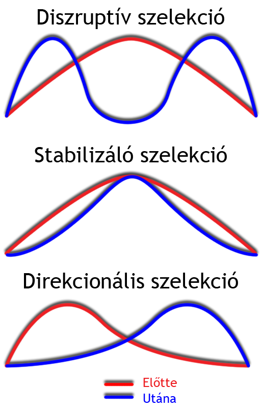 A természetes szelekció három altípusa.